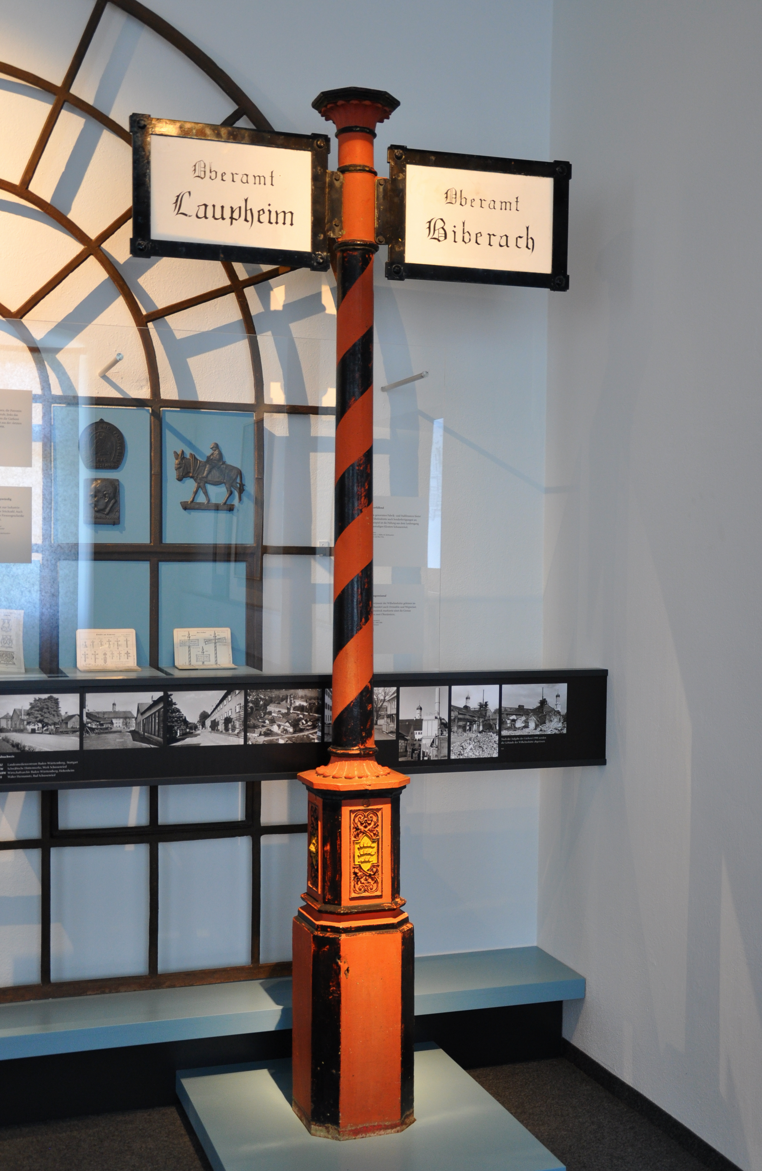 Württembergischer Oberamts-Grenzstock aus den 1890er Jahren, zur Aufstellung zwischen dem Oberamt Laupheim und dem Oberamt Biberach; hergestellt in der Wilhelmshütte Schussenried; ausgestellt im Neuen Kloster Schussenried